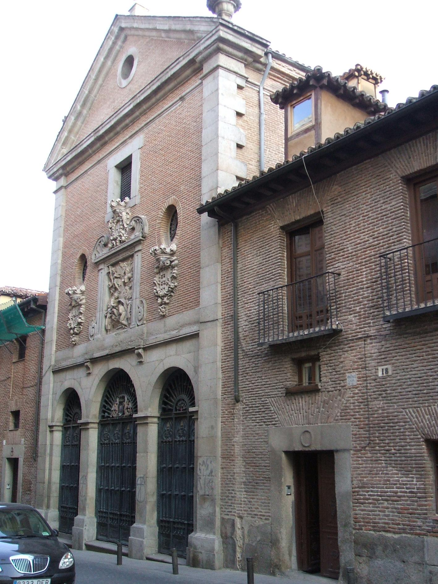 Convento de las Trinitarias de Madrid, o de San Ildefonso y San Juan de Mata, lugar donde están los restos de San Juan de Mata y Miguel de Cervantes